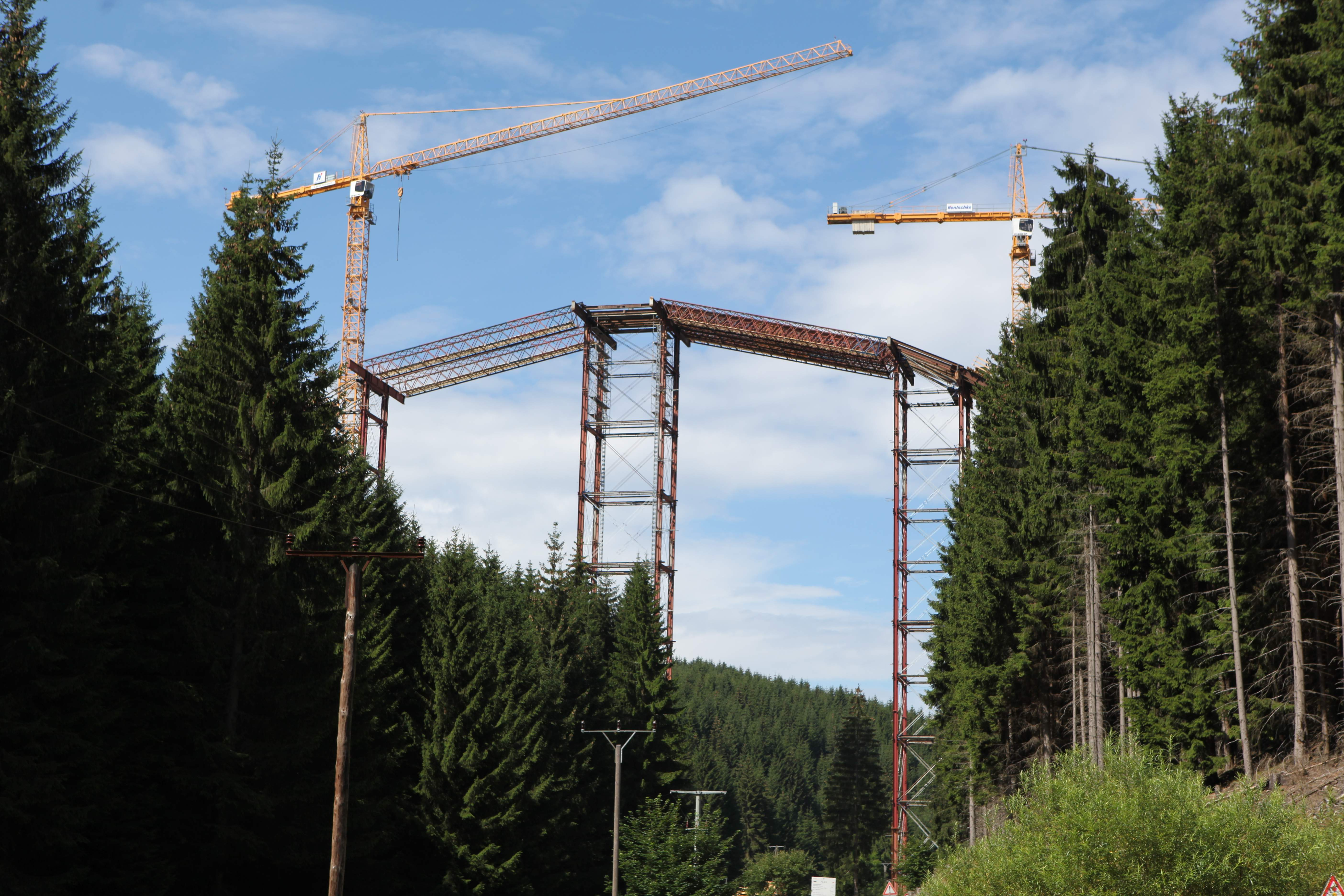 Massetalbrücke bei Katzhütte im Landkreis Saalfeld-Rudolstadt